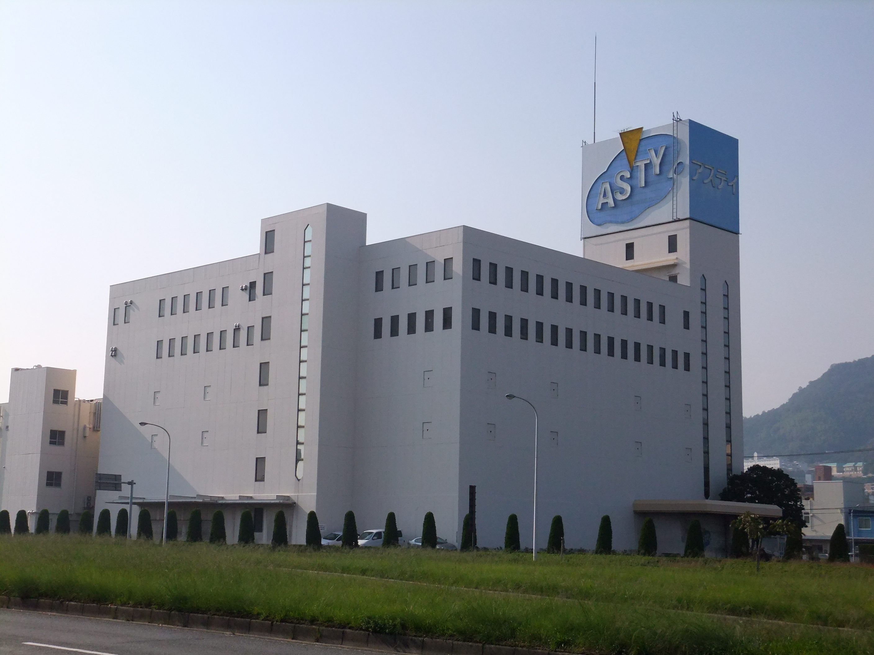 アスティ本社